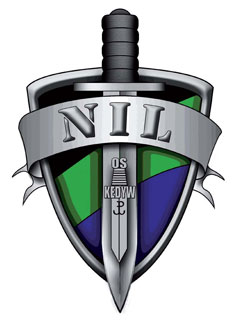 Odznaka pamiątkowa JW NIL ustanowiona decyzją Nr 305/MON MINISTRA OBRONY NARODOWEJ z dnia 10 sierpnia 2010 r. w sprawie wprowadzenia odznaki pamiątkowej oraz oznaki rozpoznawczej Jednostki Wsparcia Dowodzenia i Zabezpieczenia Wojsk Specjalnych